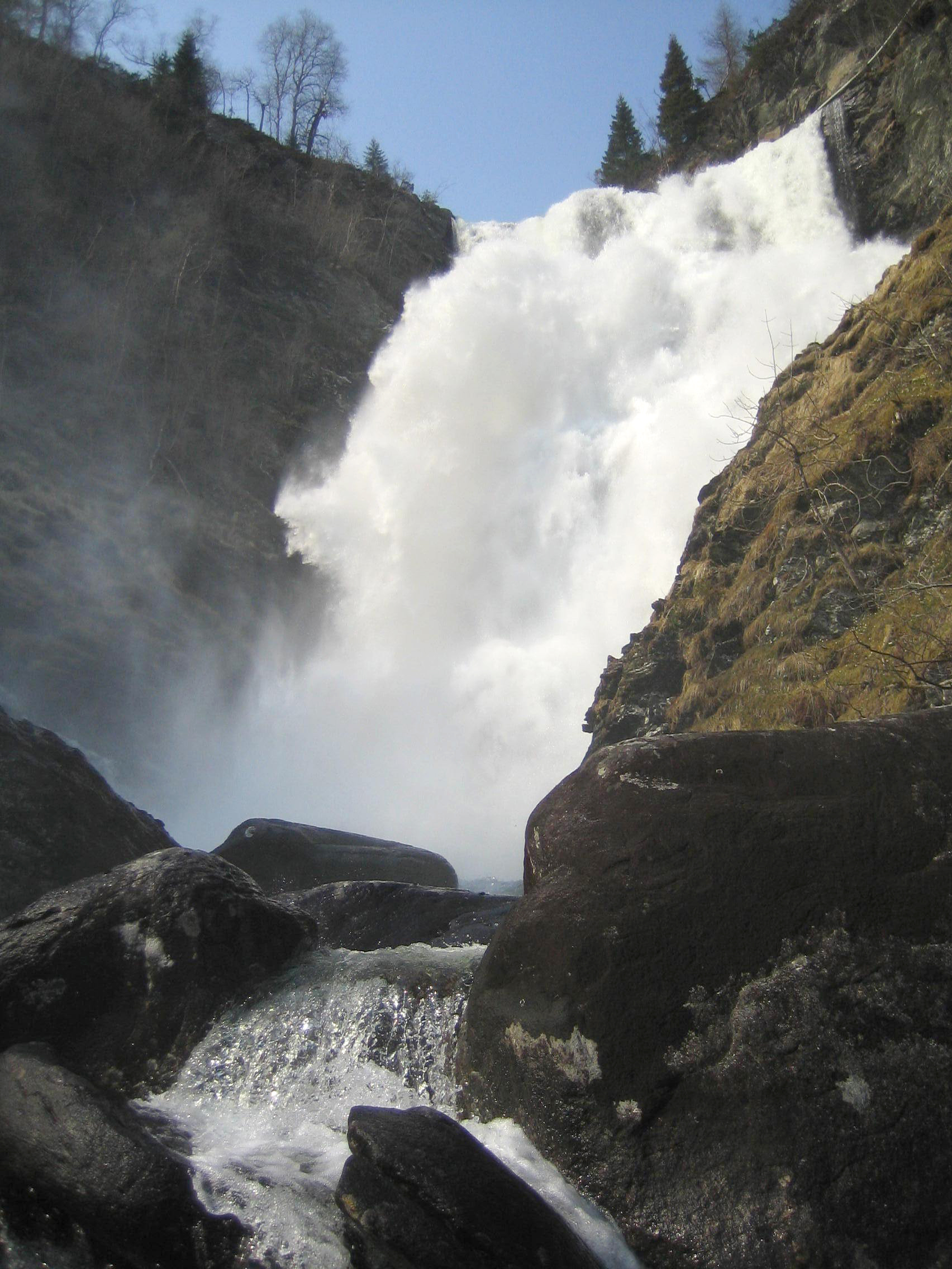 Ørredalsfossen i Øystesevassdraget i Hordaland.